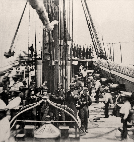 Imagen de la cubierta y tripulación de la Esmeralda en 1861, años antes del combate. Es una imagen que la Armada pidió restaurar al fotografo especialiasta Jaime Villaseca, ya que la placa estaba partida.